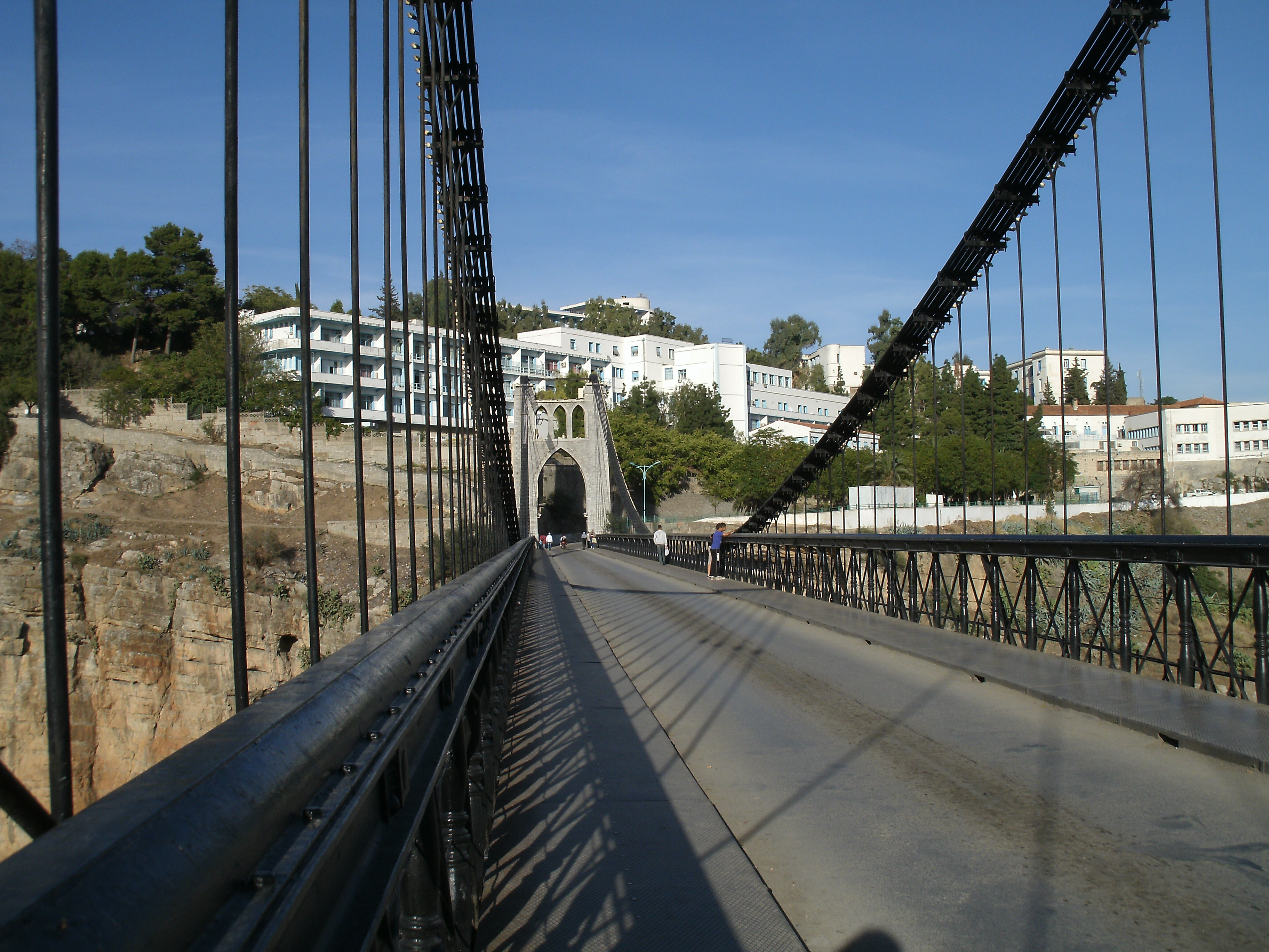 Le pont de Sidi M'Cid